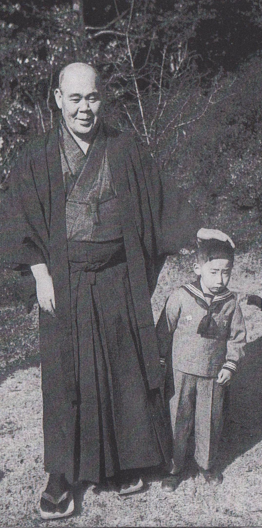 着物姿の永野修身